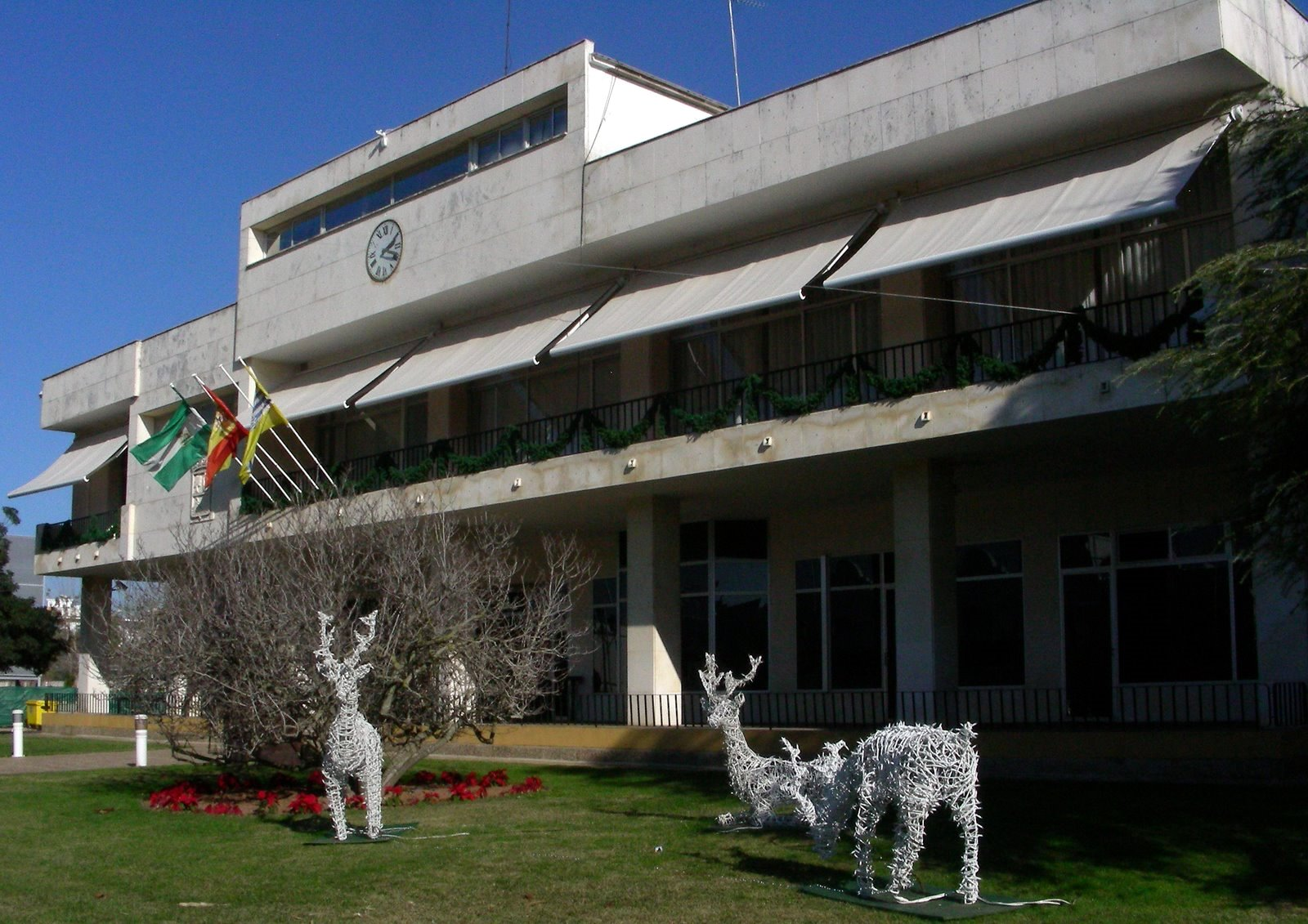 Vista principa del ayuntamiento de Isla Cristina en la navidad de 2008